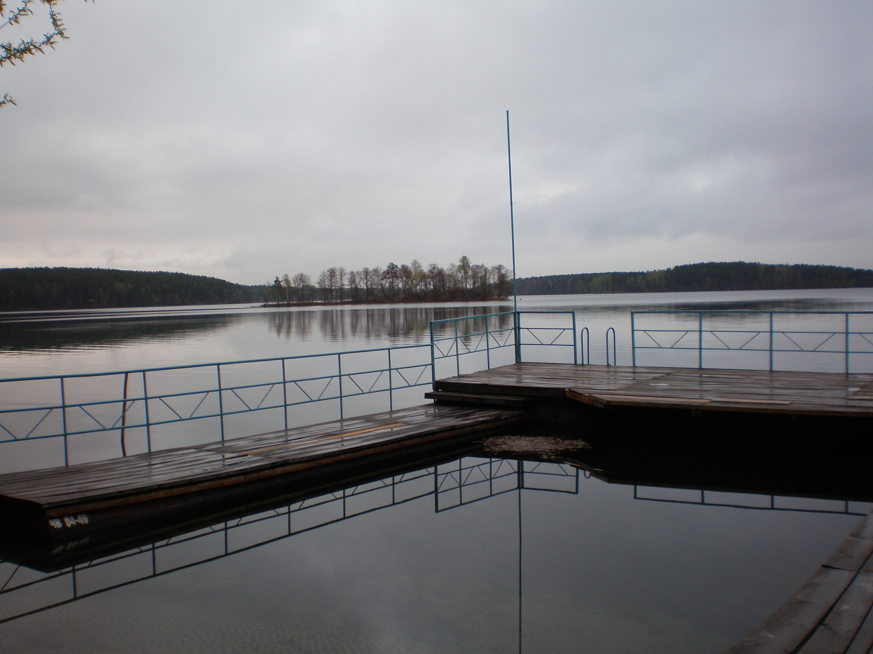 озеро Еловое